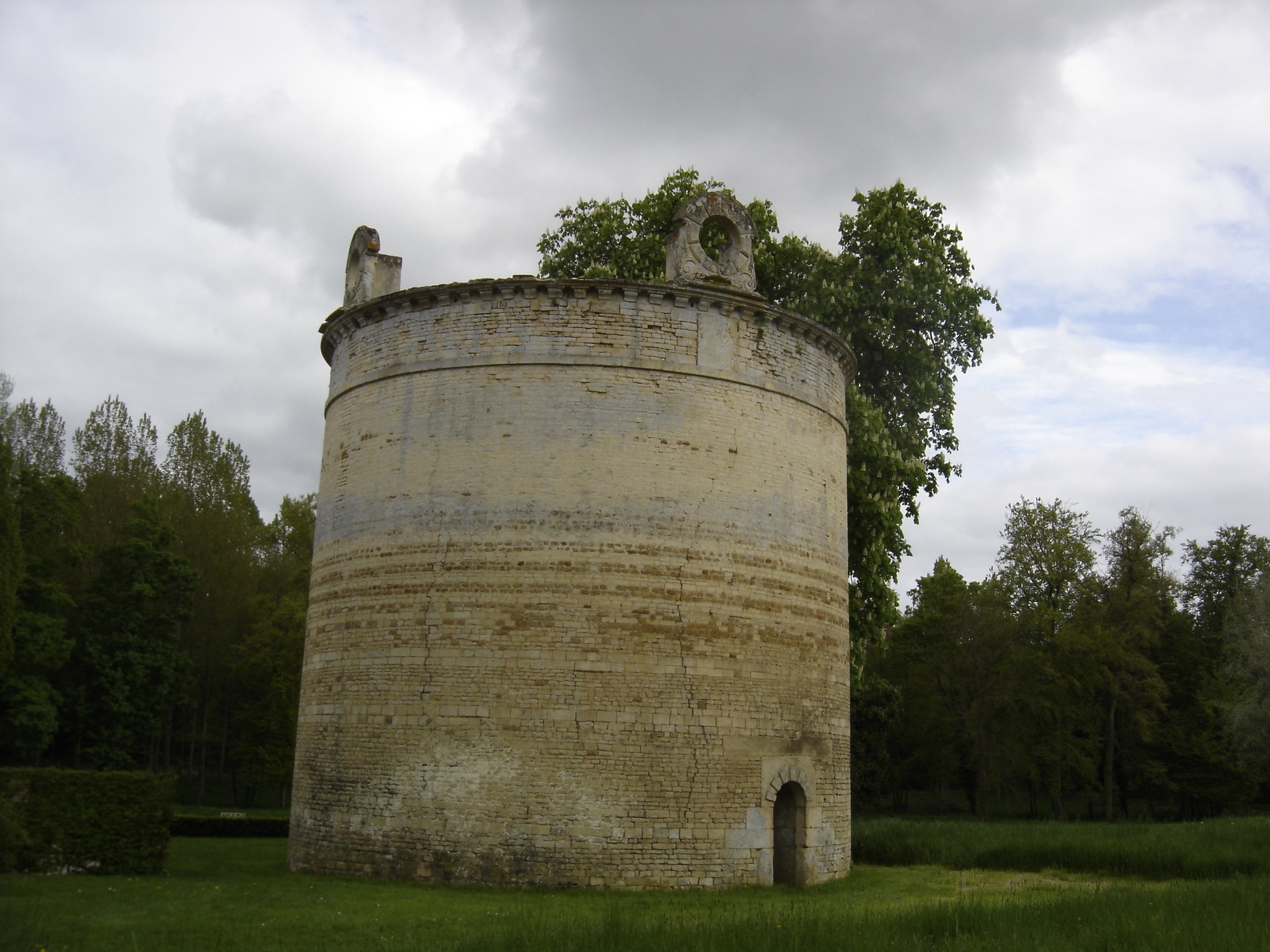 colombier du Château d'Outrelaize dont la toiture en forme de dôme surmonté d'un clocheton a disparu